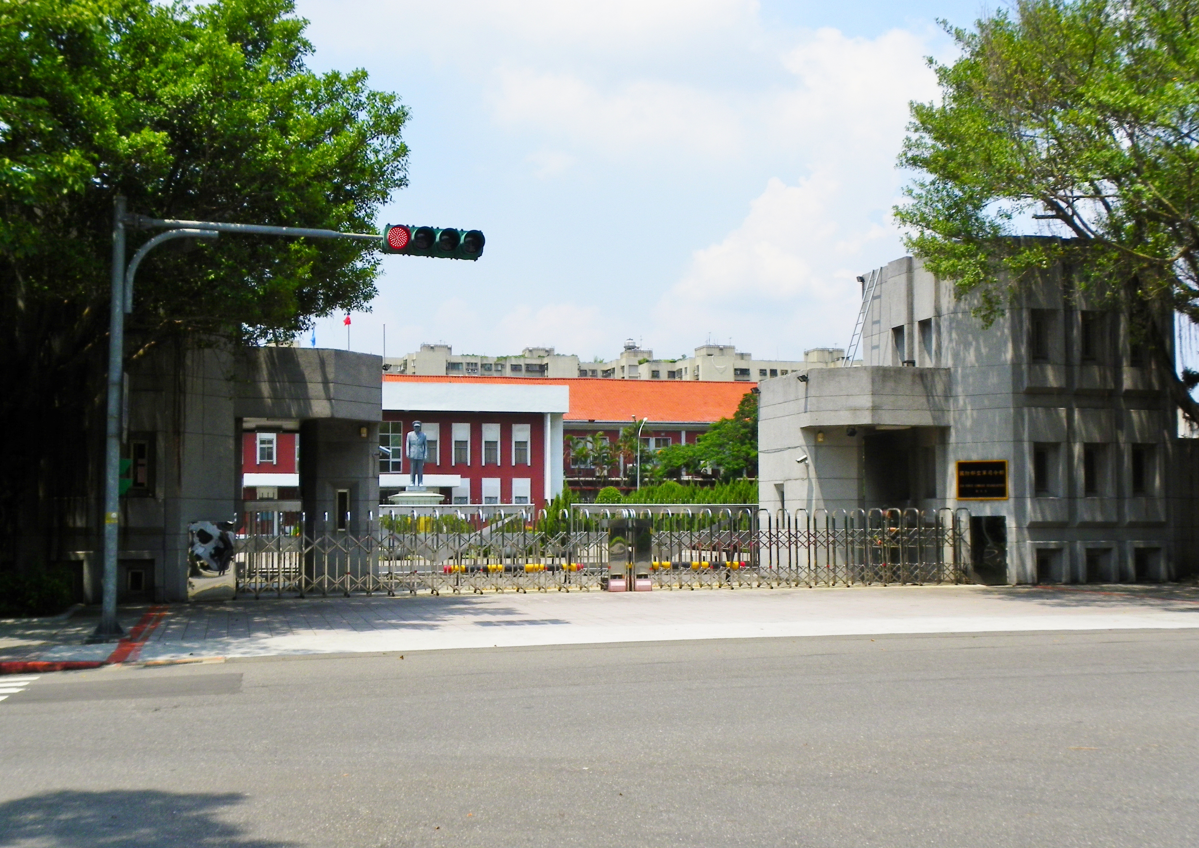 中華民國國防部空軍司令部（仁愛營區）正門，地址：106 臺北市大安區仁愛路三段55號。